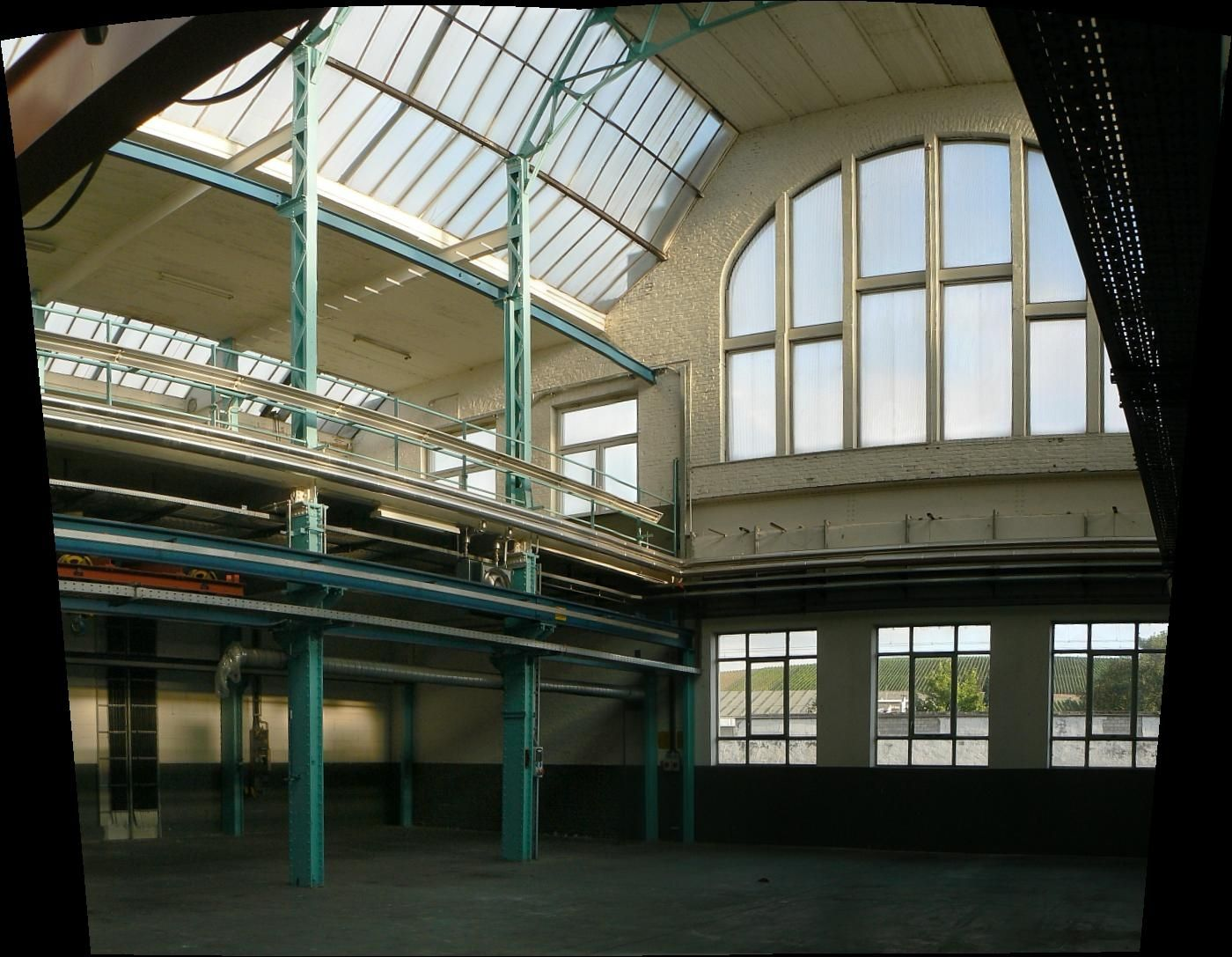 Innenansicht der Alten Werkshalle in Geisenheim. Erbaut 1906. Zunächst im Besitz der Maschinenfabrik Johannisberg Klein, Forst & und Bohn Nachfolger zu Geisenheim a. Rh.. Bis 2006 Standort des Druckmaschinenherstellers MAN Roland AG.